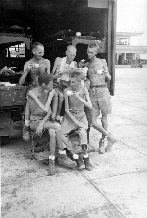 Repronegatief. Enkele bevrijde krijgsgevangenen uit een Japans interneringskamp te Palembang op Sumatra.